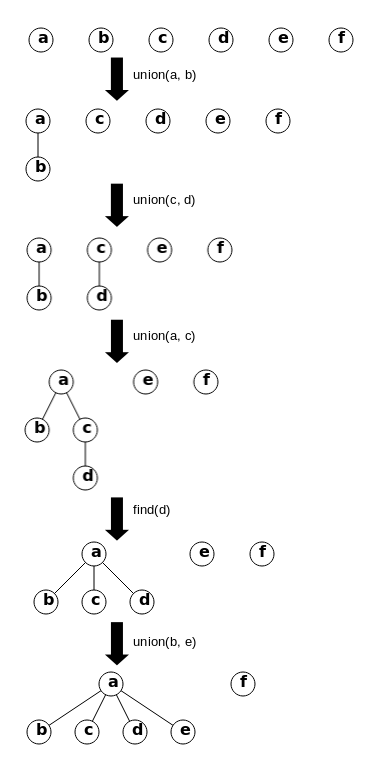 Description of a use of union-find